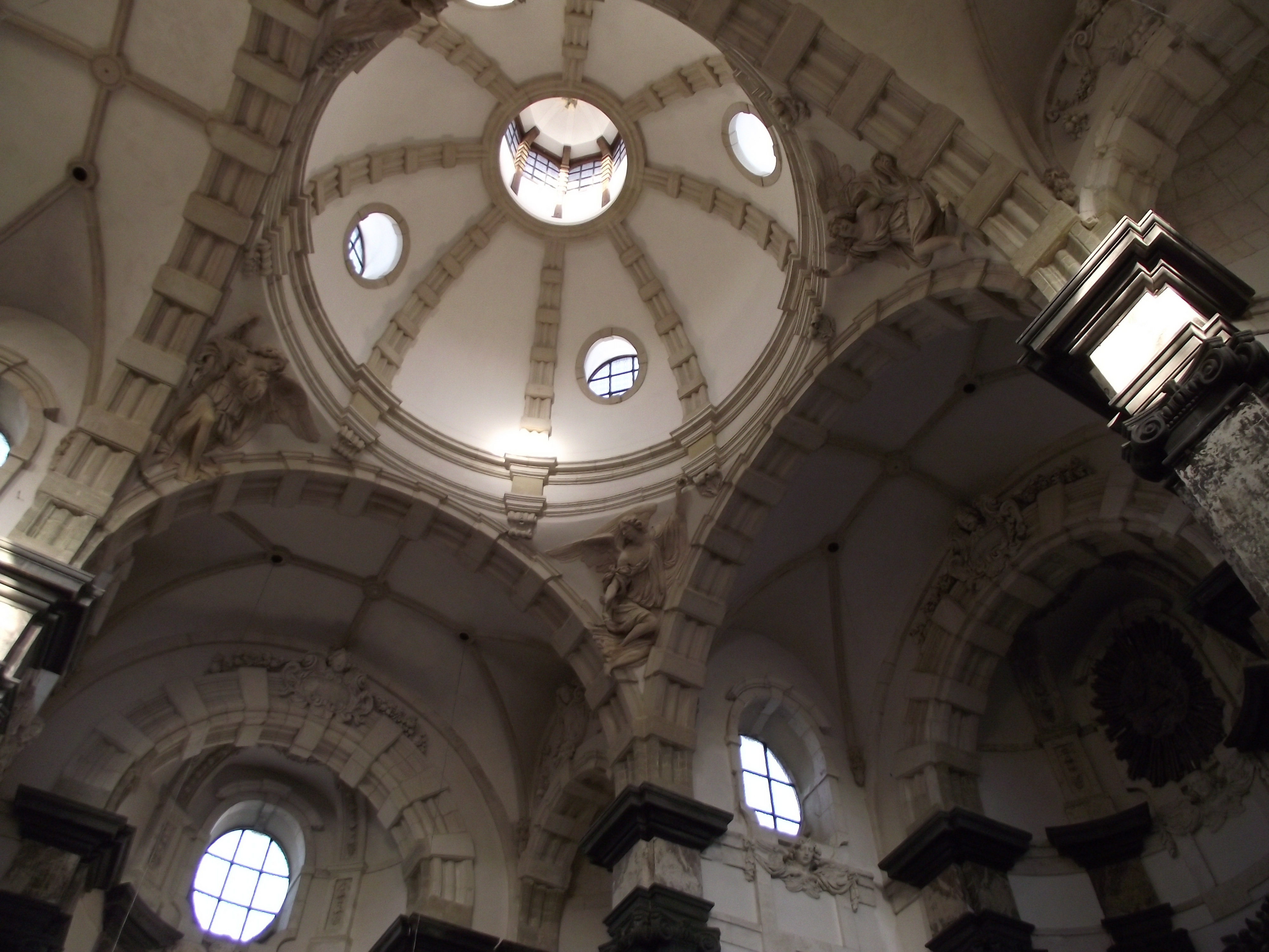 Bruxelles, Chiesa della Madonna delle Clarisse, L.Faydherbe, 1665-70